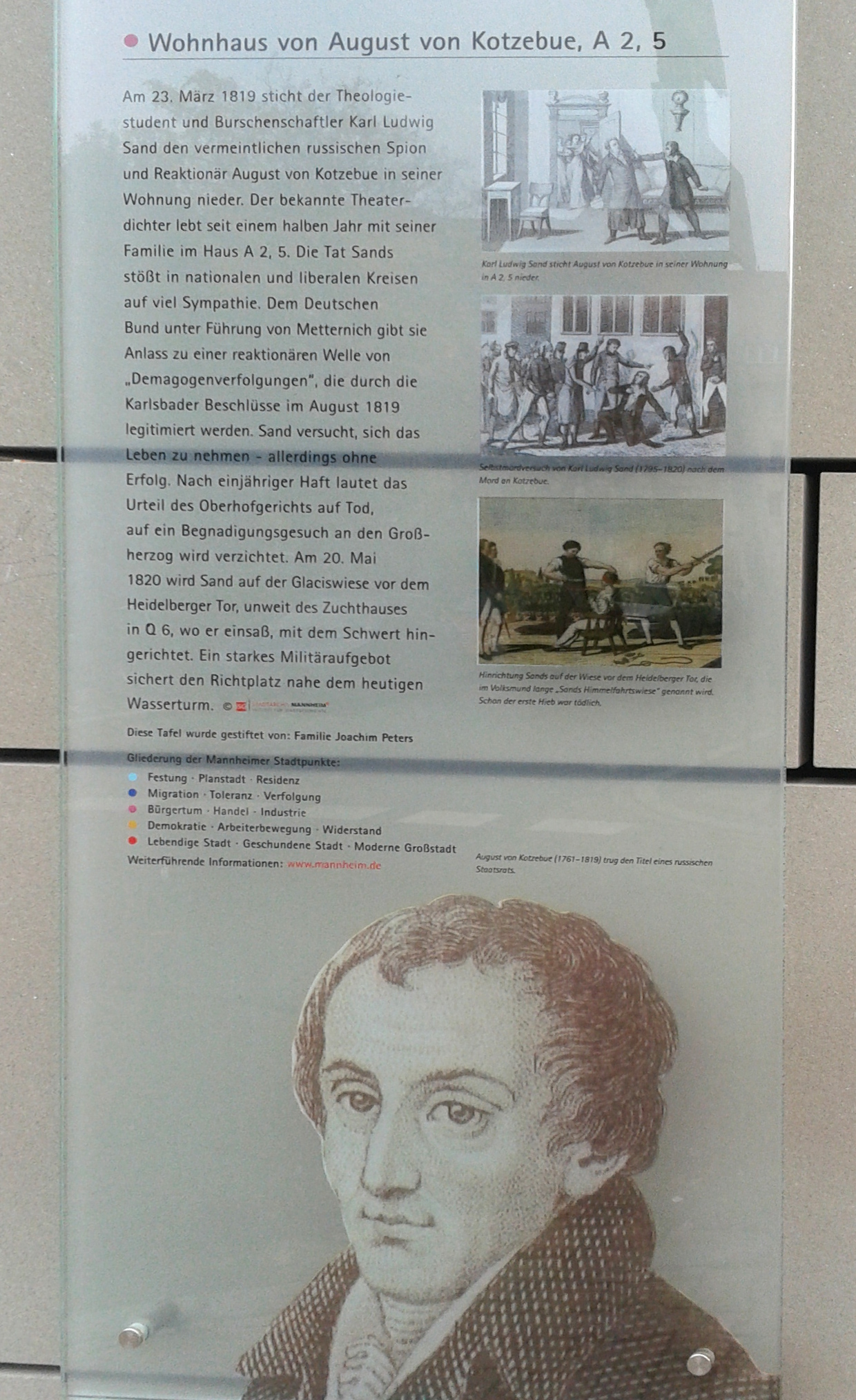 Wohnhaus von August von Kotzebue, A2, 5, Mannheim